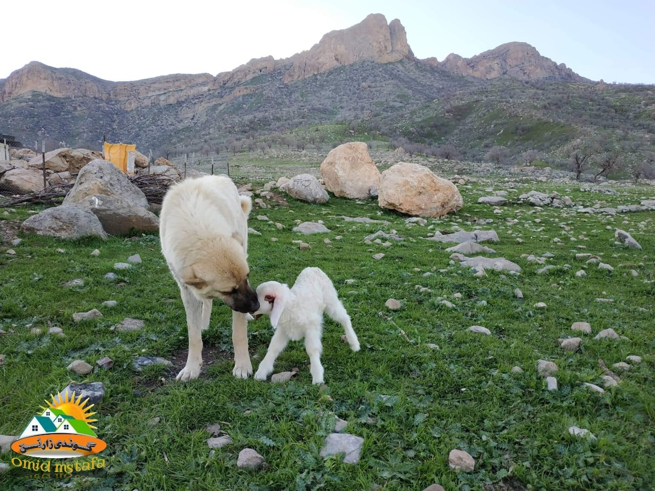 کوردی: ناو گوندی زارێن